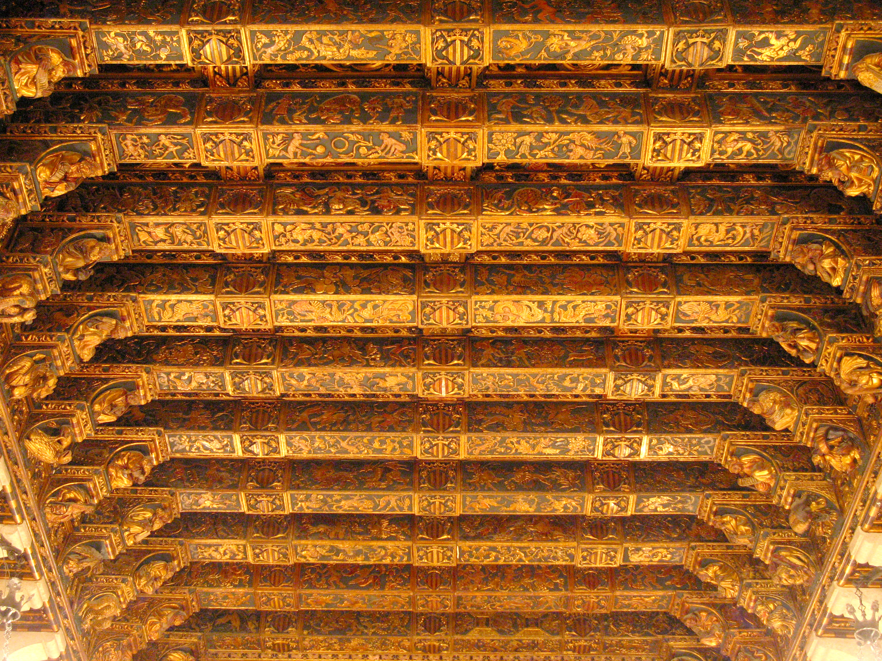 Escut de la ciutat a un cantó de la Llotja de la Seda, entre els carrers de Pere Comte i de la Llotja, València. Valencia Coat of Arms in a corner between Pere Comte and La Llotja streets, in the Silk Exchange (Llotja de la Seda) Valencia, Spain.